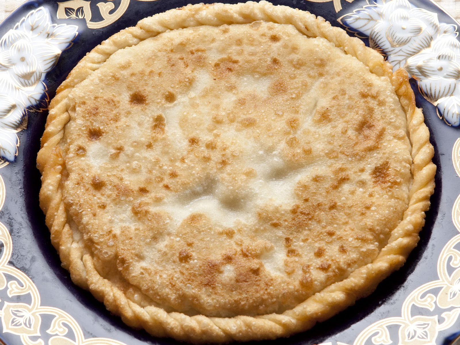 ゴシナン。シルクロード・タリム（東京）調理。